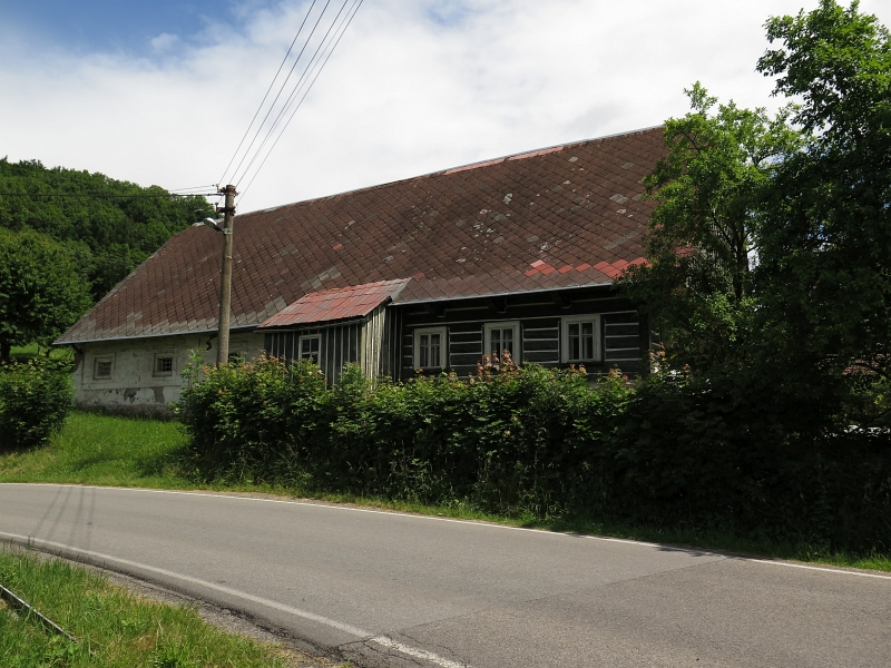 Dům čp. 105, Víchová nad Jizerou 105, při silnici, Víchová nad Jizerou.